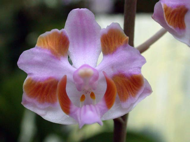 Doritis pulcherrima mit deformierten Petalen (die Petalen weisen jeweils den Ansatz zur Ausbildung einer weiteren Lippe auf)